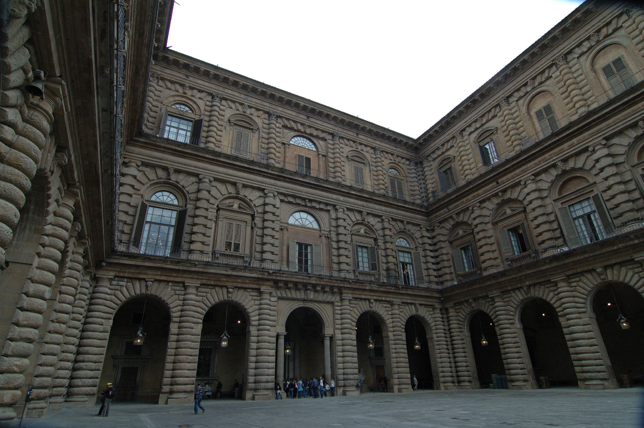 Cortile di Palazzo Pitti. Firenze, Toscana, Italia.